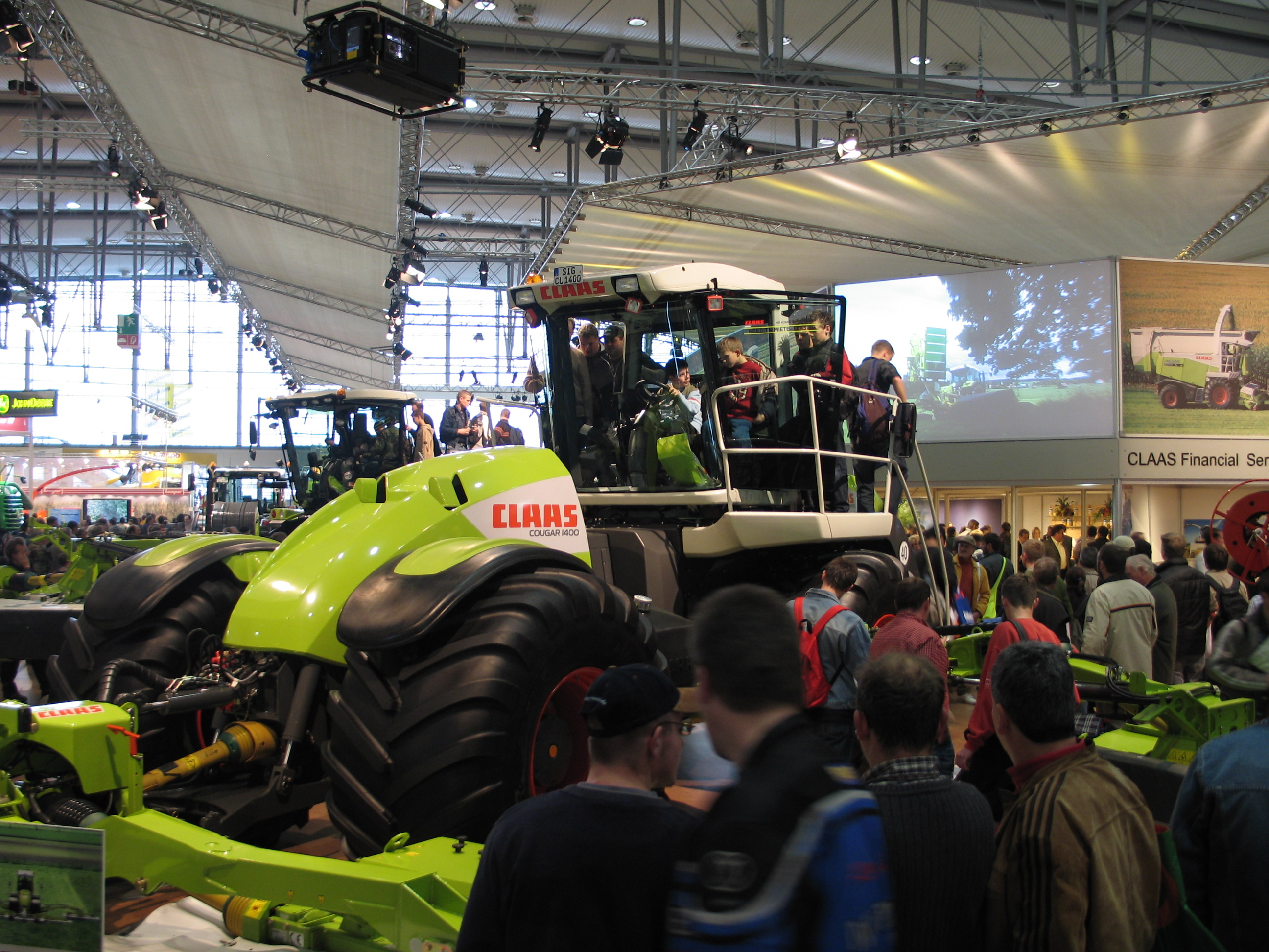 Selbstfahrmäher Cougar 1400 von Claas mit einer Arbeitsbreite von 14 m auf der Agritechnica Hannover 2005